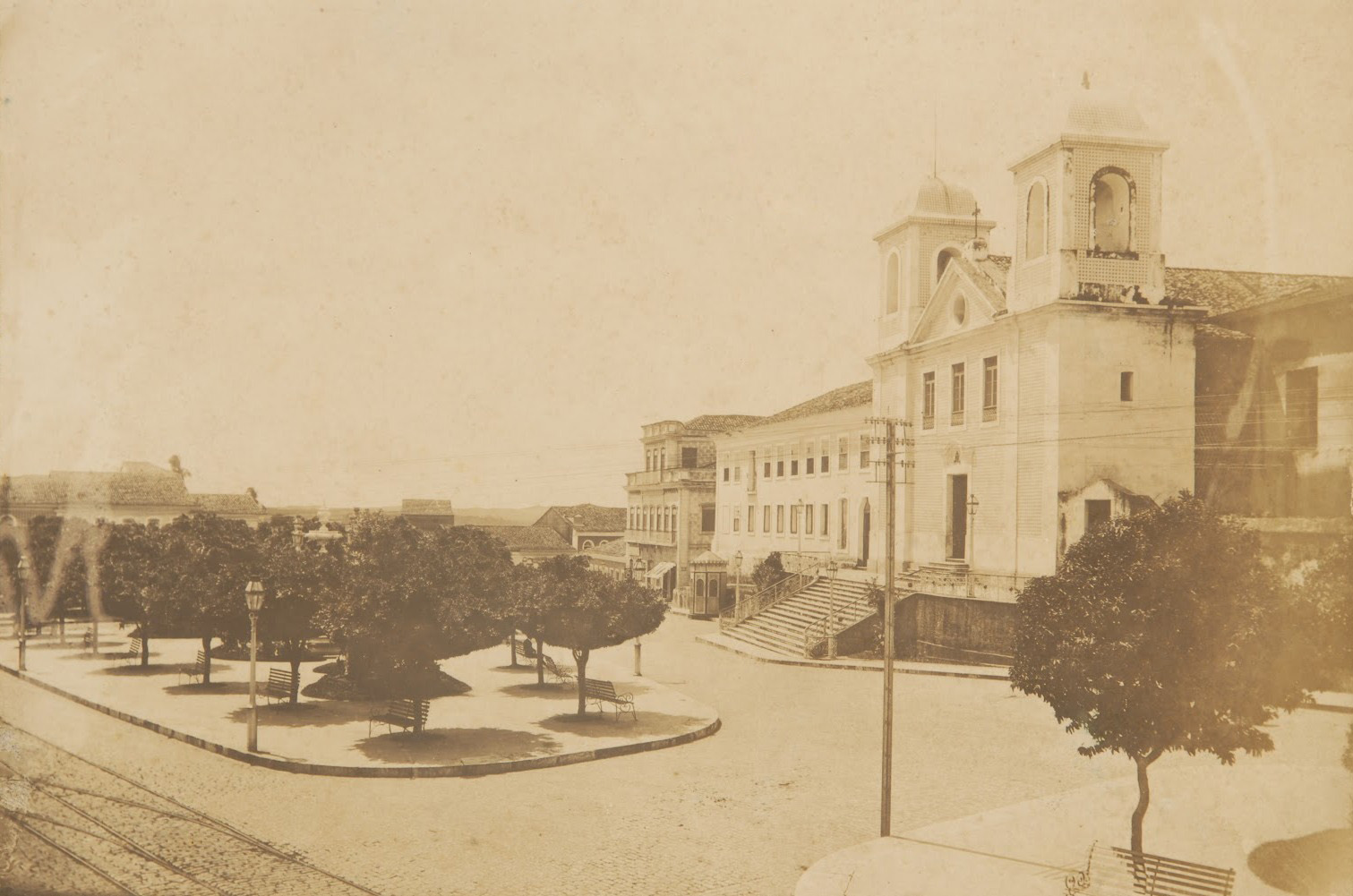 Fotografia do largo do Carmo (Praça João Lisboa) em 1908, cujo autor, Gaudêncio Cunha, faleceu em 1920.